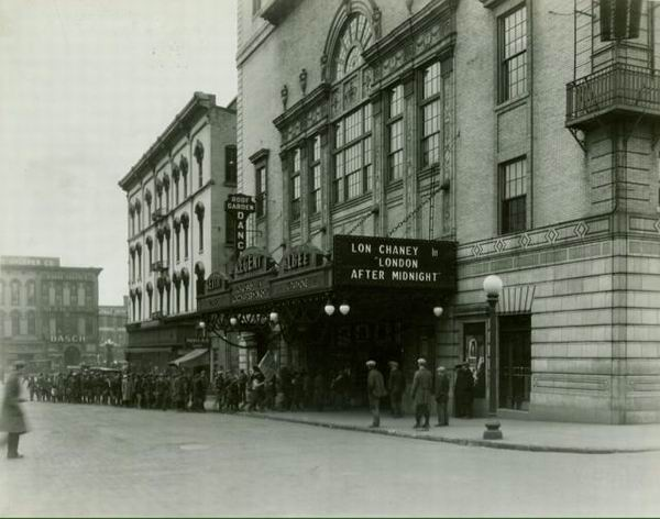 Очередь на фильм Лондон после полуночи в 1930 году